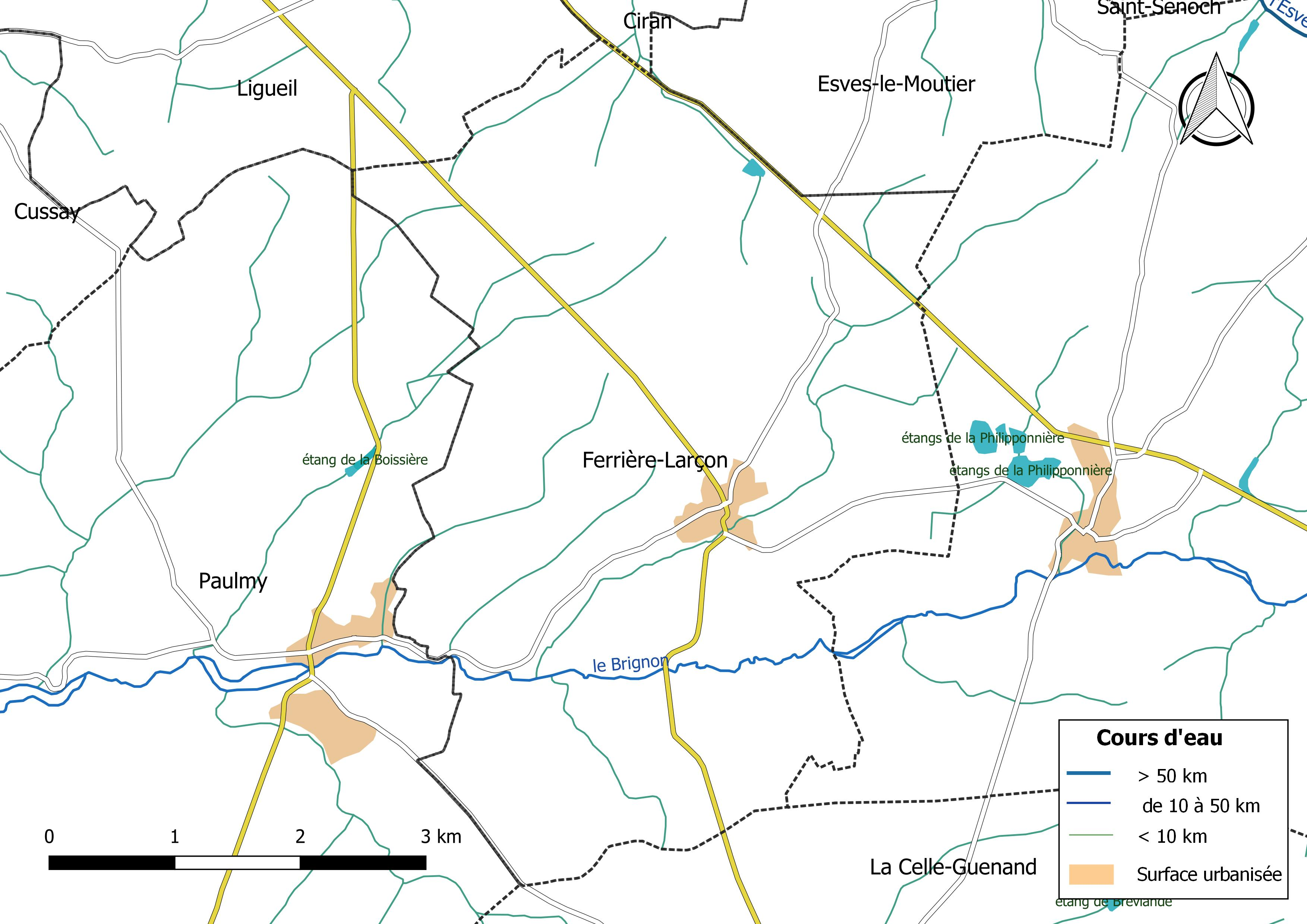 Carte du réseau hydrographique de la commune de Ferrière-Larçon (France).